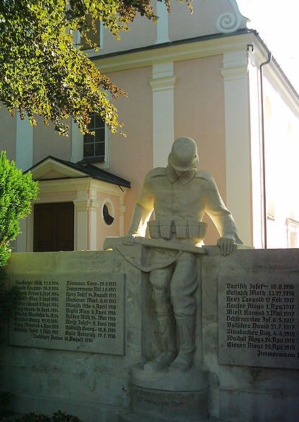 Römisch-Katholische Pfarrkirche St.Gordianus und Epimachus, Kriegerdenkmal für die gefallenen und vermissten Söhne des Ortes in den Weltkriegen I und II.